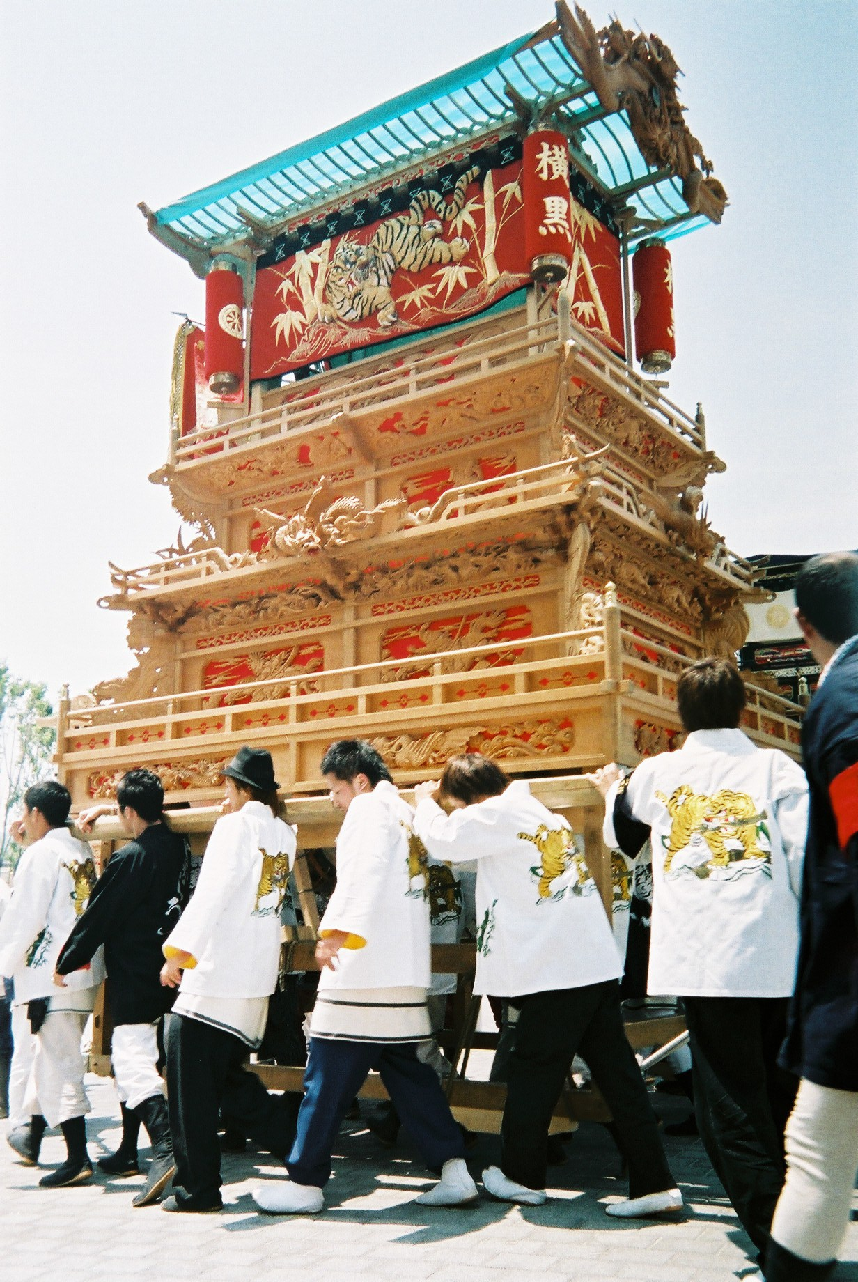 毎年10月中旬に行われる 愛媛県 西条市 の祭礼、西条祭りに登場するだんじり。 楽車とも表記する。 全国でも珍しい担ぎ屋台(舁き山車)で、四方を美しく精緻で立体的な透かし彫りで飾る。 二階構造の屋台と三階の屋台が存在するが、どちらを持つかは町内ごとの判断による。 高さ4.5m～5m前後（これは屋台ごとの個体差が大きい)､ 重量は二階屋台なら約600kg前後、三階なら約700kg前後となるが 近年の流行として新調屋台の彫りが年々豪華になる傾向があり、重量級の屋台が多くなってきている。 通常15、6人～20人ほどの舁き夫で担ぎ､鳴り物は屋台の中にある。 楽車の名にふさわしく、リズミカルでテンポのいい鳴り物囃子で担ぎ、伊勢音頭やデカンショ節、 また全国浦々の伝統的な謡曲や最近の流行歌なども取り入れた非常に数多く多彩な祭り唄を歌う。